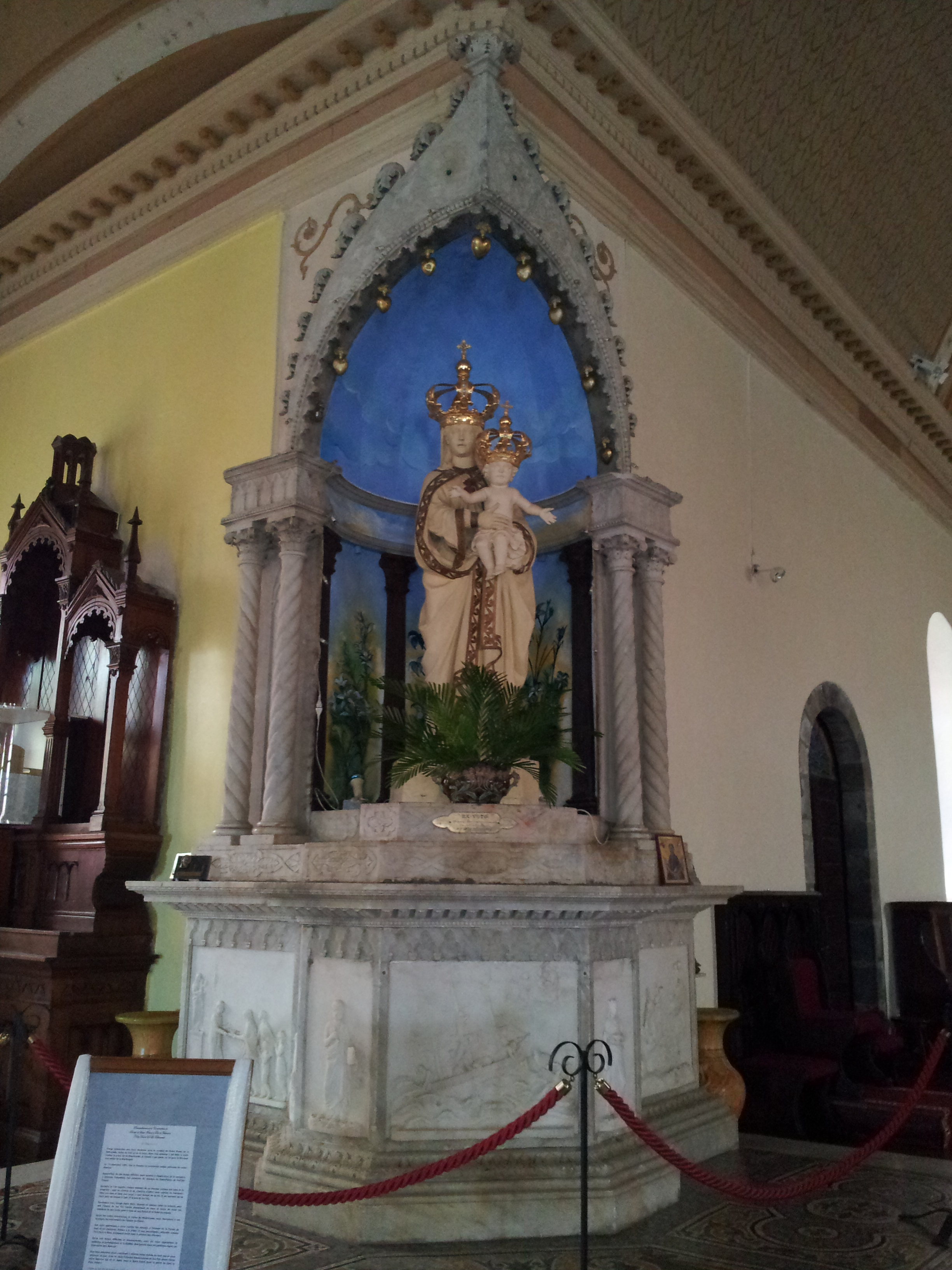 Notre-Dame de la Délivrande